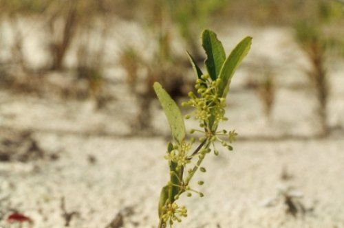 Smilax campestris - SMILACACEAE Praia do Mo�ambique - Florian�polis - SC - Brasil